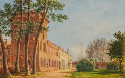 La Villa Trivulzio a Locate di Triulzi